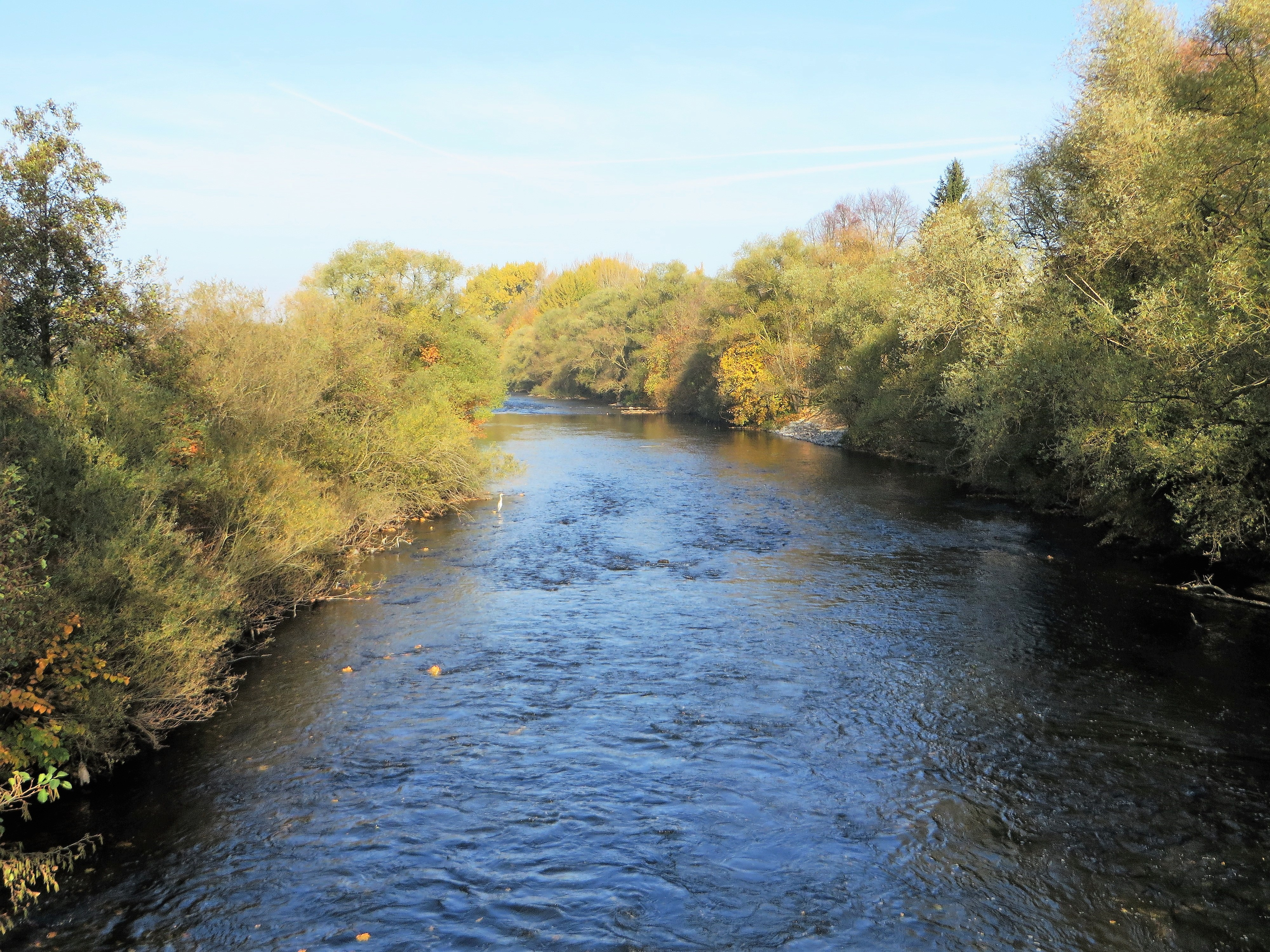 Blick von der Kettenbrücke auf die Lenne im Hagener Stadtteil Hohenlimburg im geschützten LSG-Lenne-Niederung zwischen Klosterkamp und im Weinhof. Im Hintergrund links im Wasser stehend ein Fischreiher.